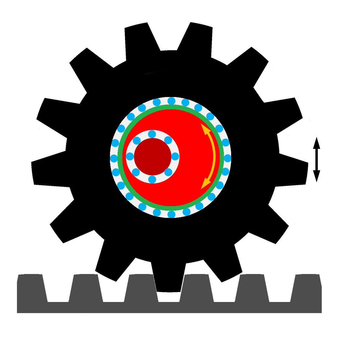 Bei den in den Jahren 2012 und 2016 abgelieferten Gelenktriebwagen ABeh 150 und ABeh 160 und 161 kommt ein neu entwickelter Zahnradantrieb mit exzentrischer Höhenverstellung zum Einsatz, der konstruktiv einem üblichen Zahnradantrieb mit Tatzlagerung entspricht, wie er von reinen Zahnradbahnen bekannt ist. Die Trieb- beziehungsweise Bremszahnräder (schwarz) stützen sich nicht direkt auf der Radsatzwelle (dunkelrot) ab, sondern auf einer zusätzlich eingefügten Hohlwelle (rot), die mit der Radsatzwelle über Exzenterscheiben verbunden sind. Durch Drehen an den Exzenterscheiben sich lässt der Zahneingriff auf einfache Weise dem Radverschleiß entsprechend in sieben Stufen von je 5 mm anpassen, wodurch ein Radverschleiß von 35 statt 12 mm möglich ist.